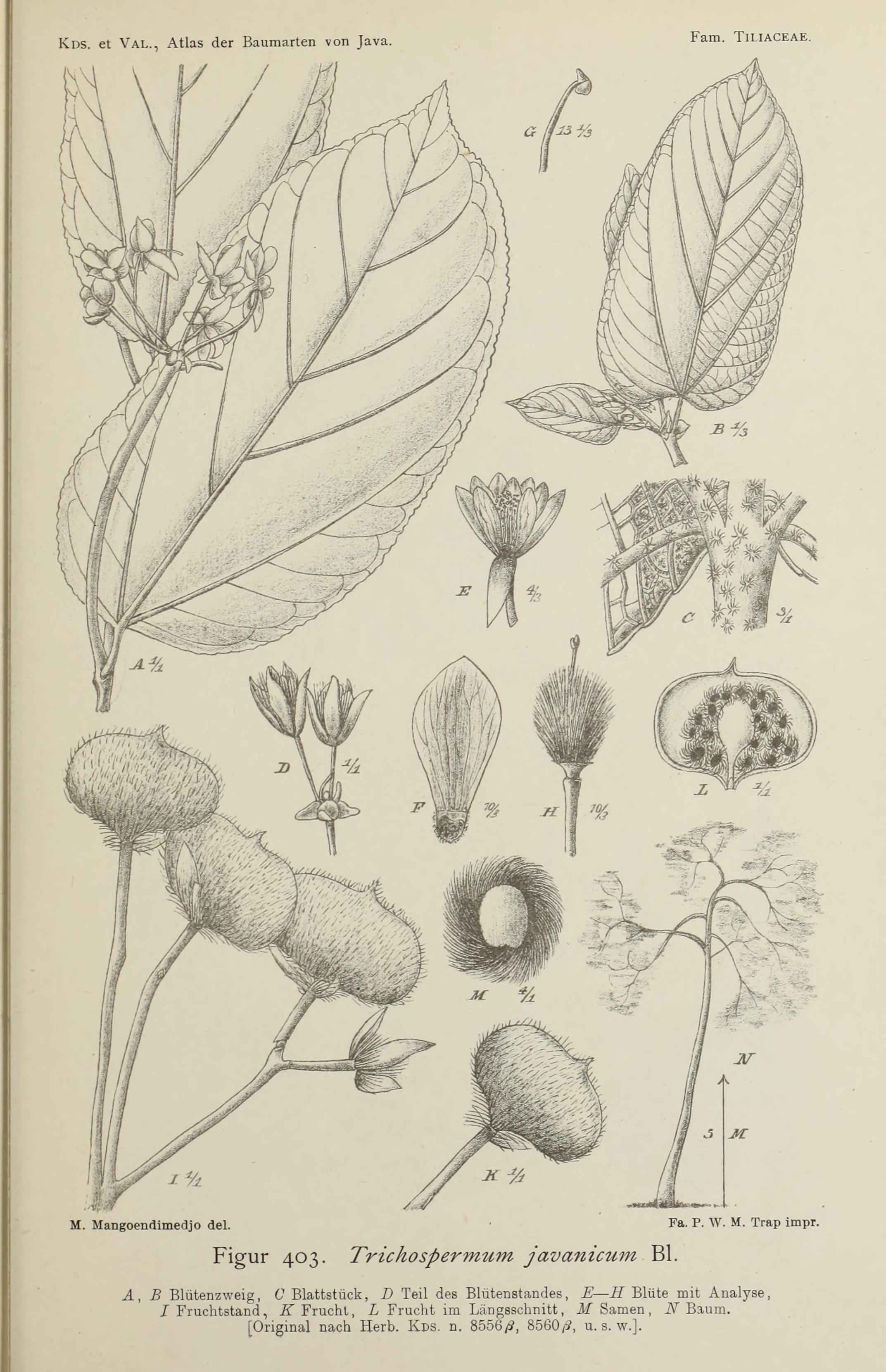 Atlas der baumarten von Java : im anschluss an die "Bijdragen tot de kennis der boomsoorten van Java" / zusammengestellt von dr. S.H. Koorders und dr. Th. Valeton ; mit unterstützung der Niederländsch- indischen regierung ; Herausgegeben von dr. S.H. Koorders.